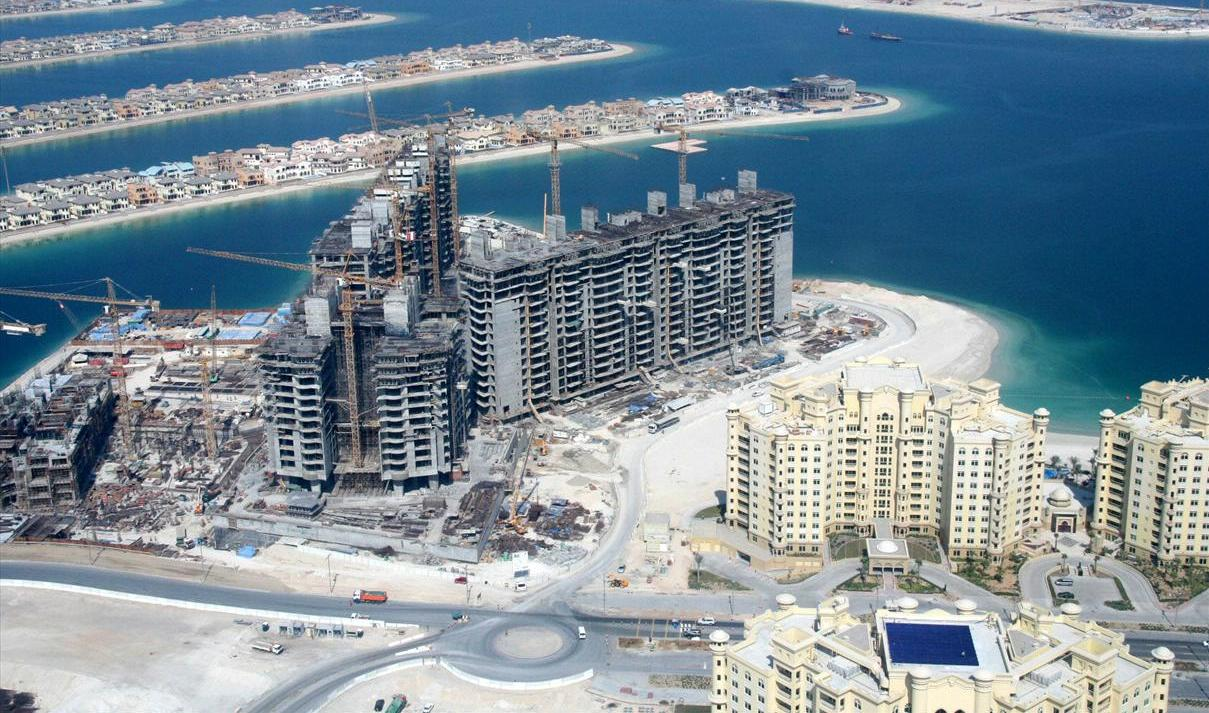 Foto de el hotel en construcción en Dubai, Oceana